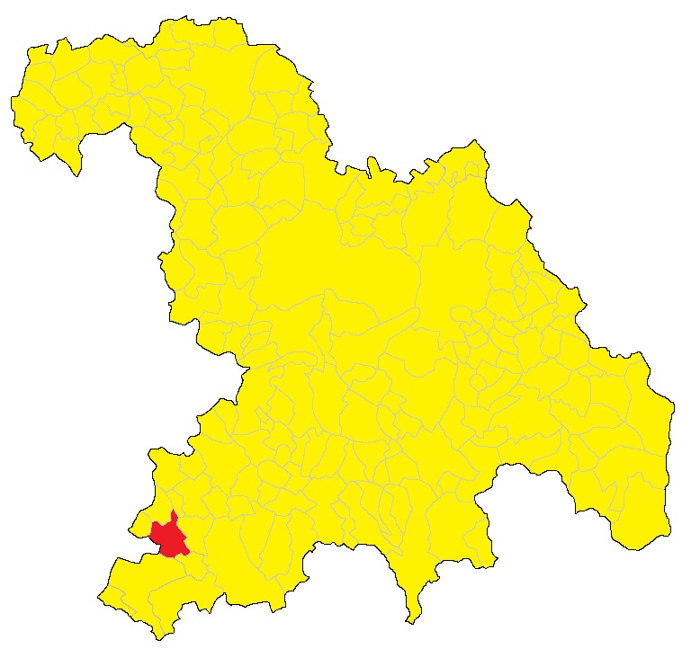 Mappa del comune di Montechiaro d'Acqui (AL)